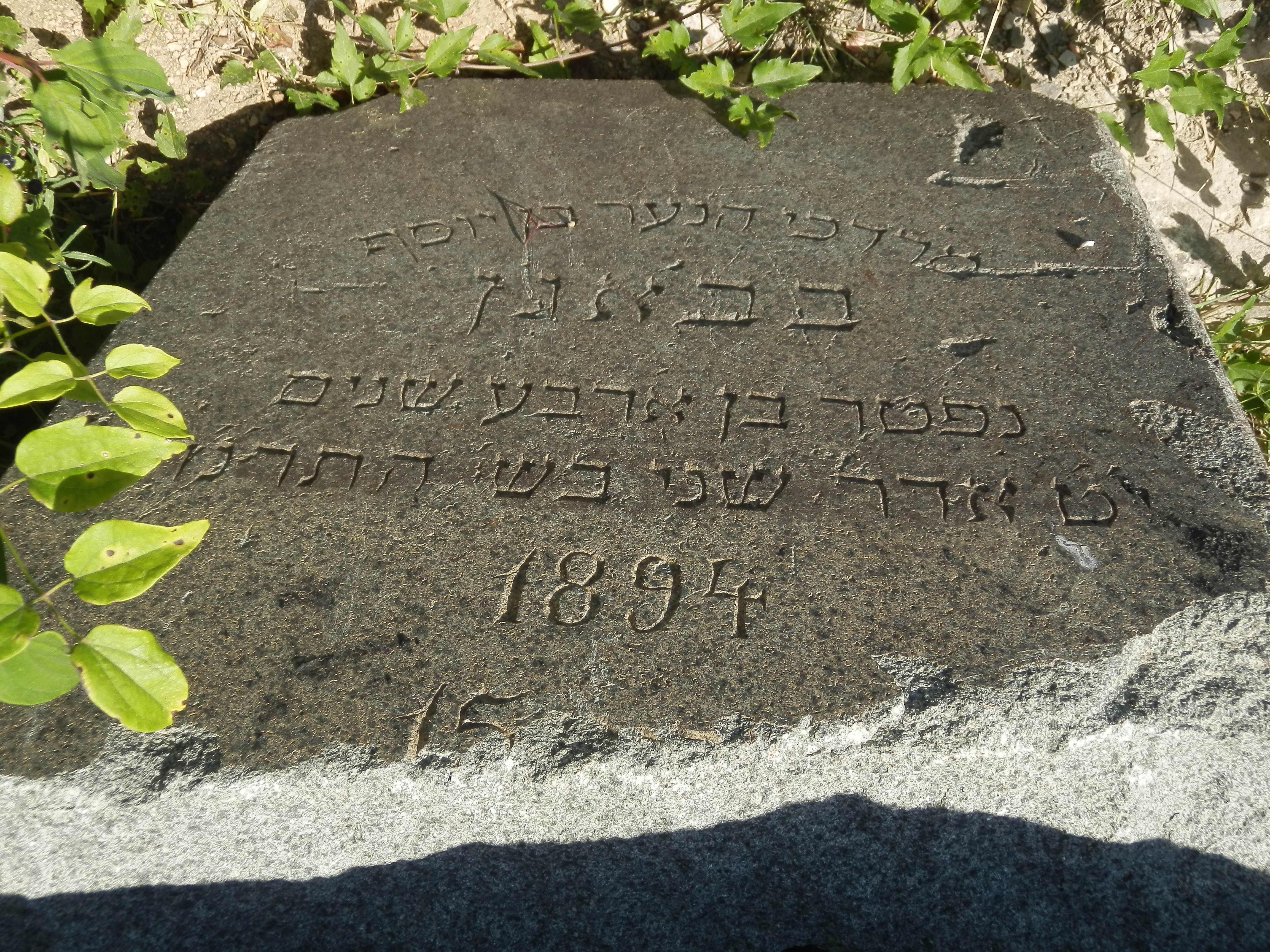 Эпитафия надгробия в лесу на гору Хаялар